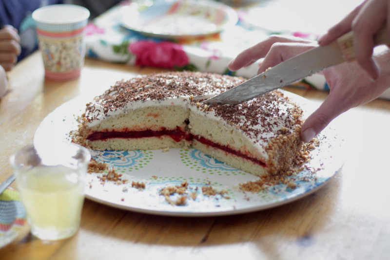 עוגה טבעונית